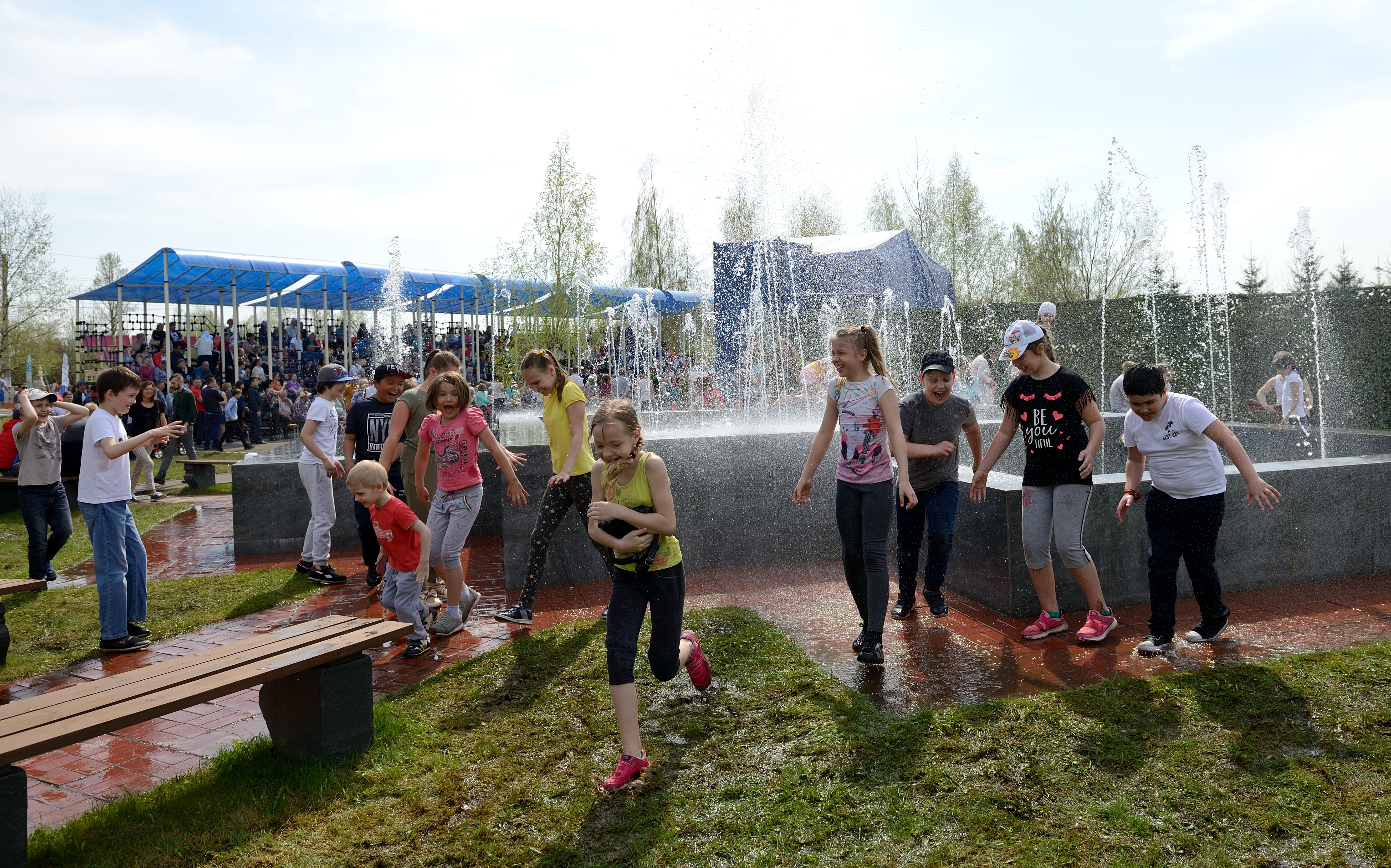 г.Москва, Поселок станции Крекшино, парк Победы, фонтан